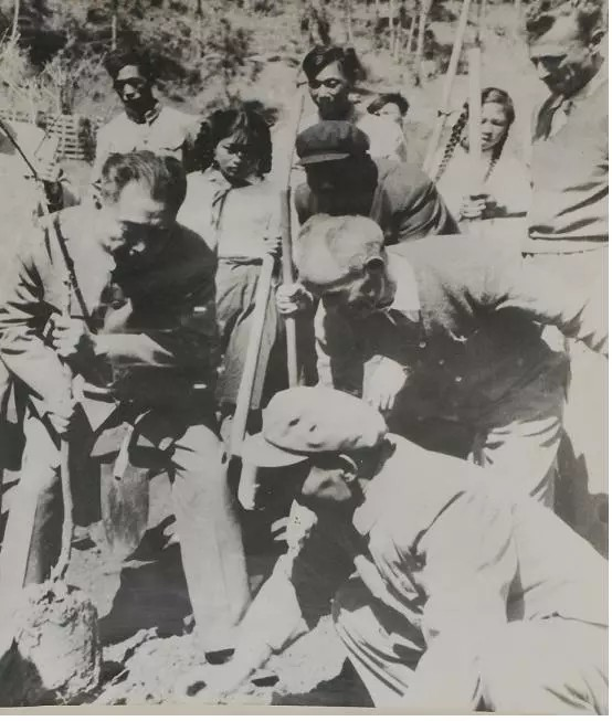 中文（中国大陆）: 1964年周恩来在昆明海口林场种植象征中阿友谊的油橄榄树